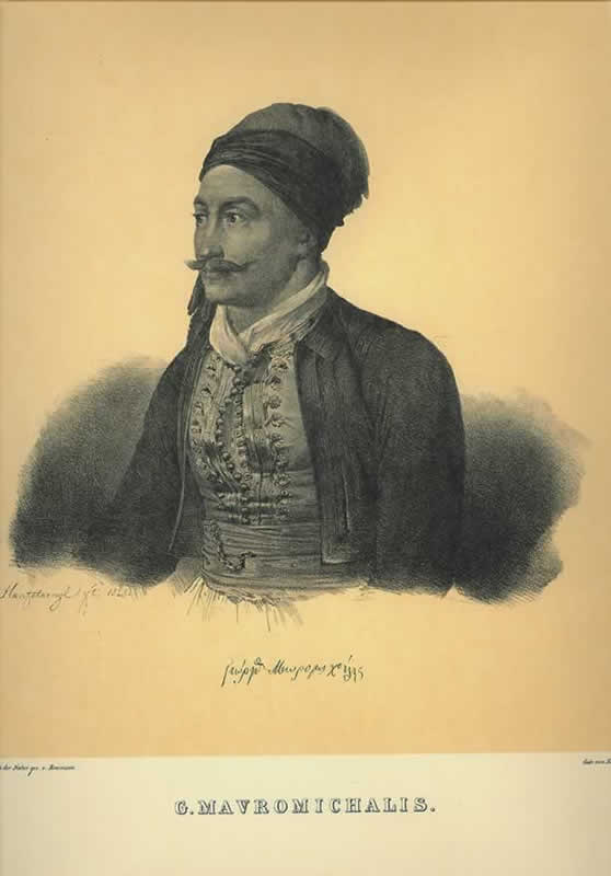 Aπό: Bildnisse ausgezeichneter Griechen und Philhellenen nebst einigen Ansichten und Trachten. Nach der Natur gezeichnet und herausgegeben von Karl Krazeisen. Munchen 1831